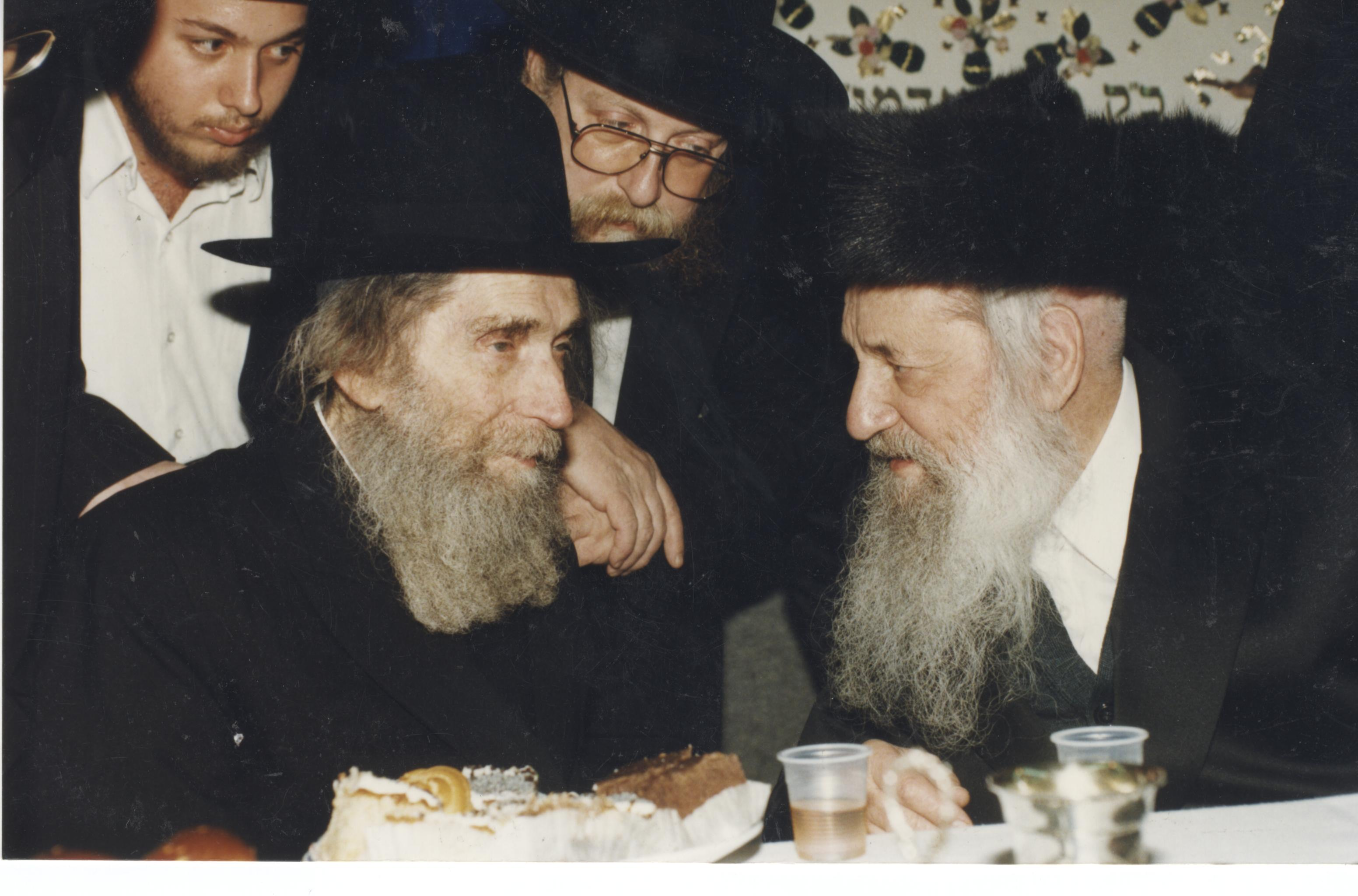 הרב שטיינמן עם הרב וואזנר